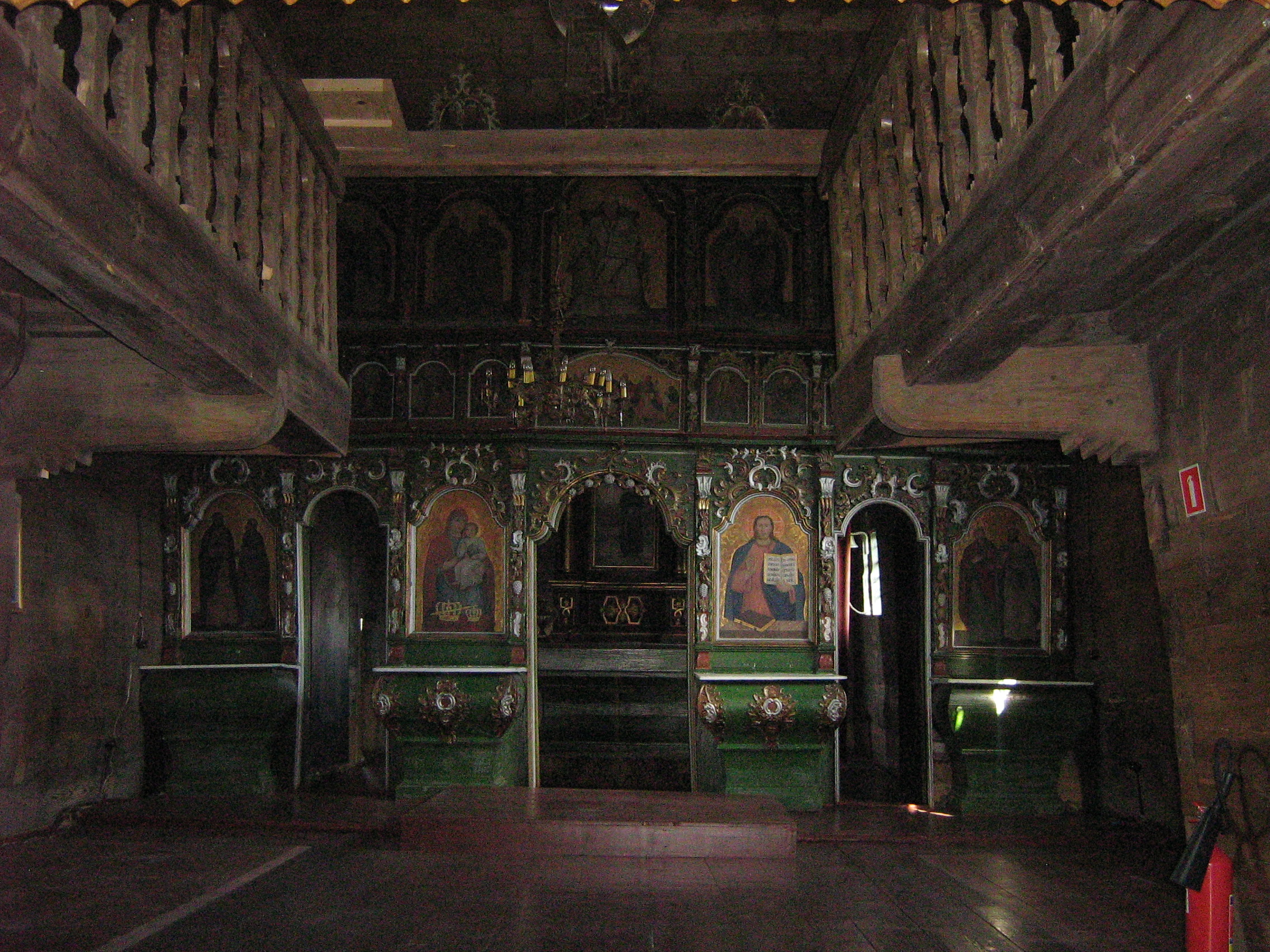 Wnętrze cerkwi w Krempnej (Beskid Niski)